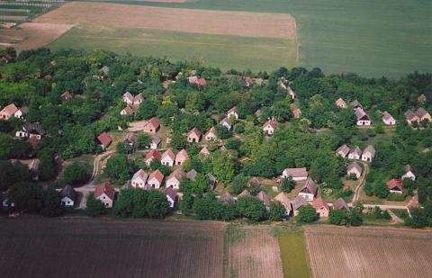 Györköny, Hungary, aerialphotography